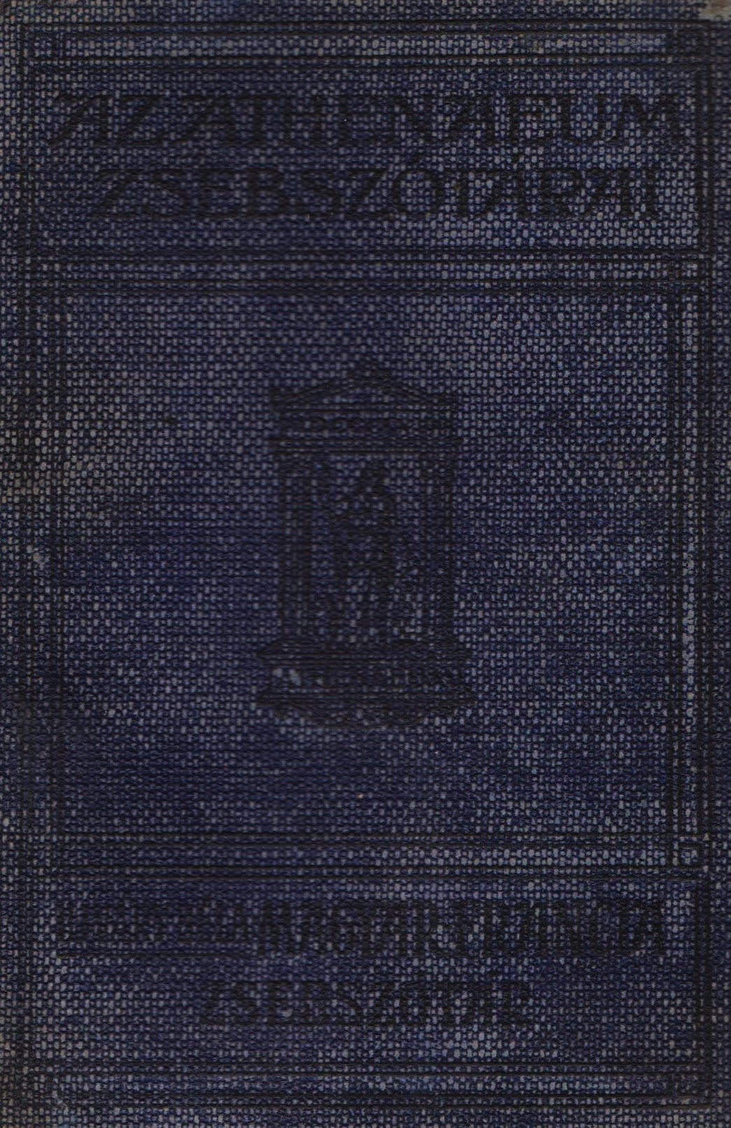 Újvári Béla: Magyar-franczia zsebszótár, 1900 k.